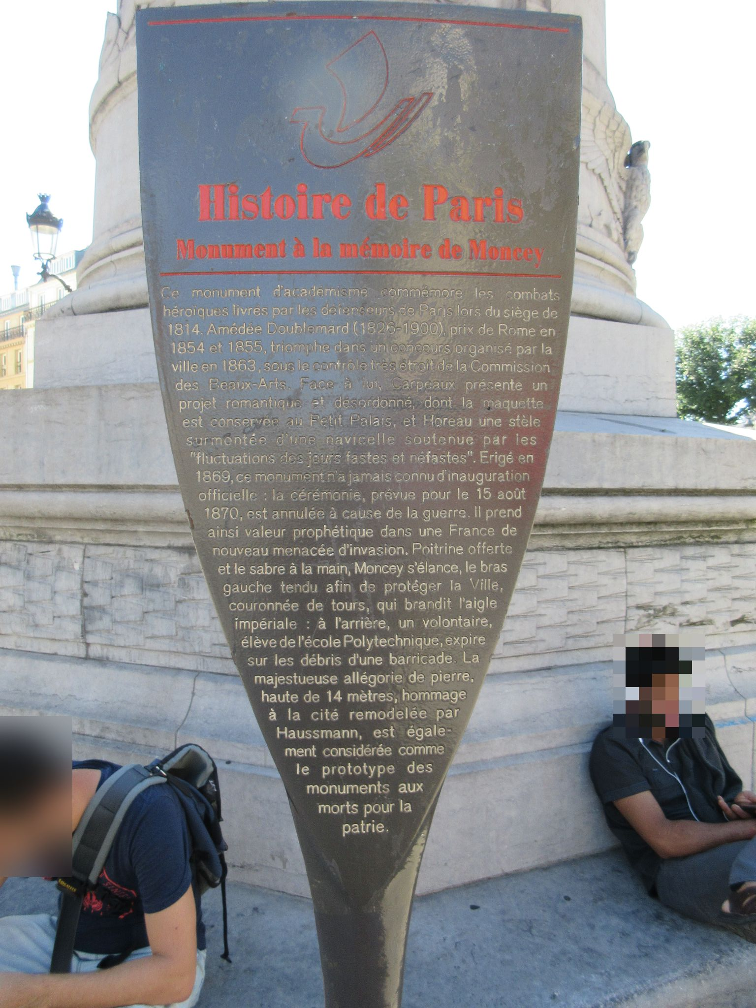 Panneau Histoire de Paris